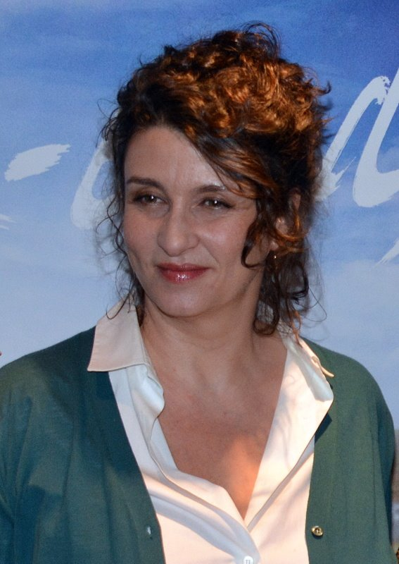 Noémie Lvovsky à l'avant-première du film "Week-ends"